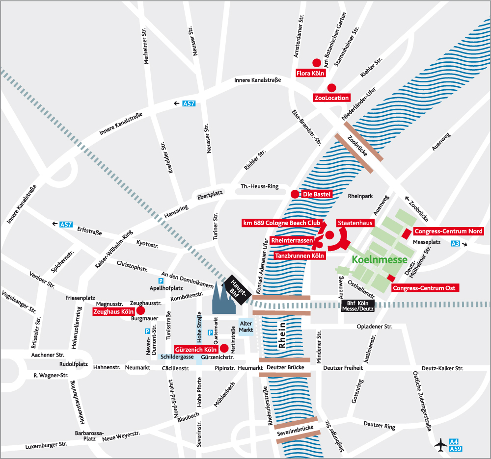 Anfahrtsplan